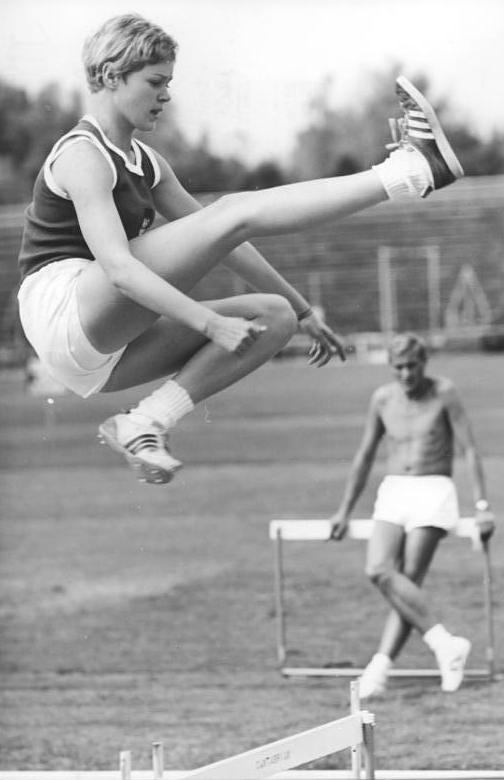 Rita Schmidt Zentralbild Koch 6.10.1968 Mexiko-Stadt: XIX. Olympische Sommerspiele 1968 (12.-27.10.) - Training der Athleten. Rita macht hohe Sprünge! Die DDR-Rekordhalterin im Hochsprung, Rita Schmidt (SC DHfK Leipzig) , beim fleißigen Training im Universitäts-Stadion von Mexiko-Stadt.